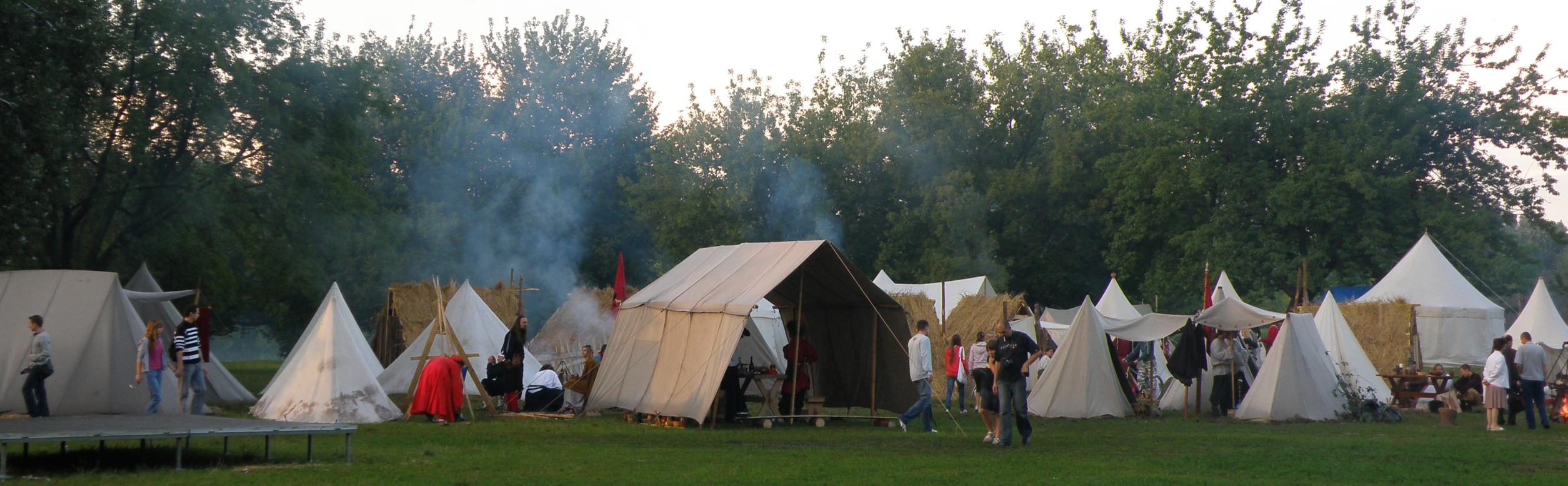 Warszawa, Park Skaryszewski, bitwa polsko-szwedzka o Warszawę z 1656 - obozowisko